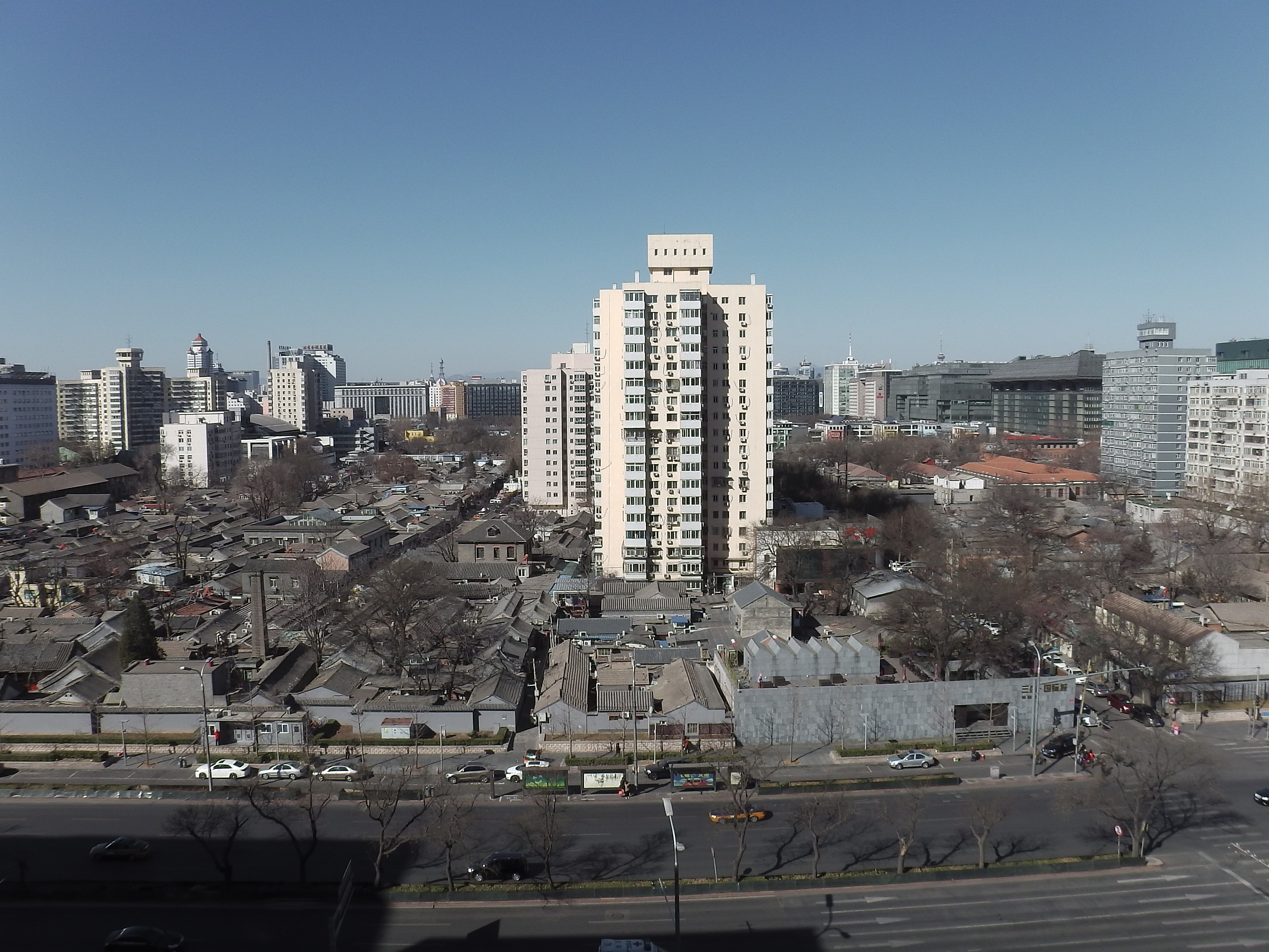 北京市 西城区 西单 新文化街 南边 2016年3月13日上午